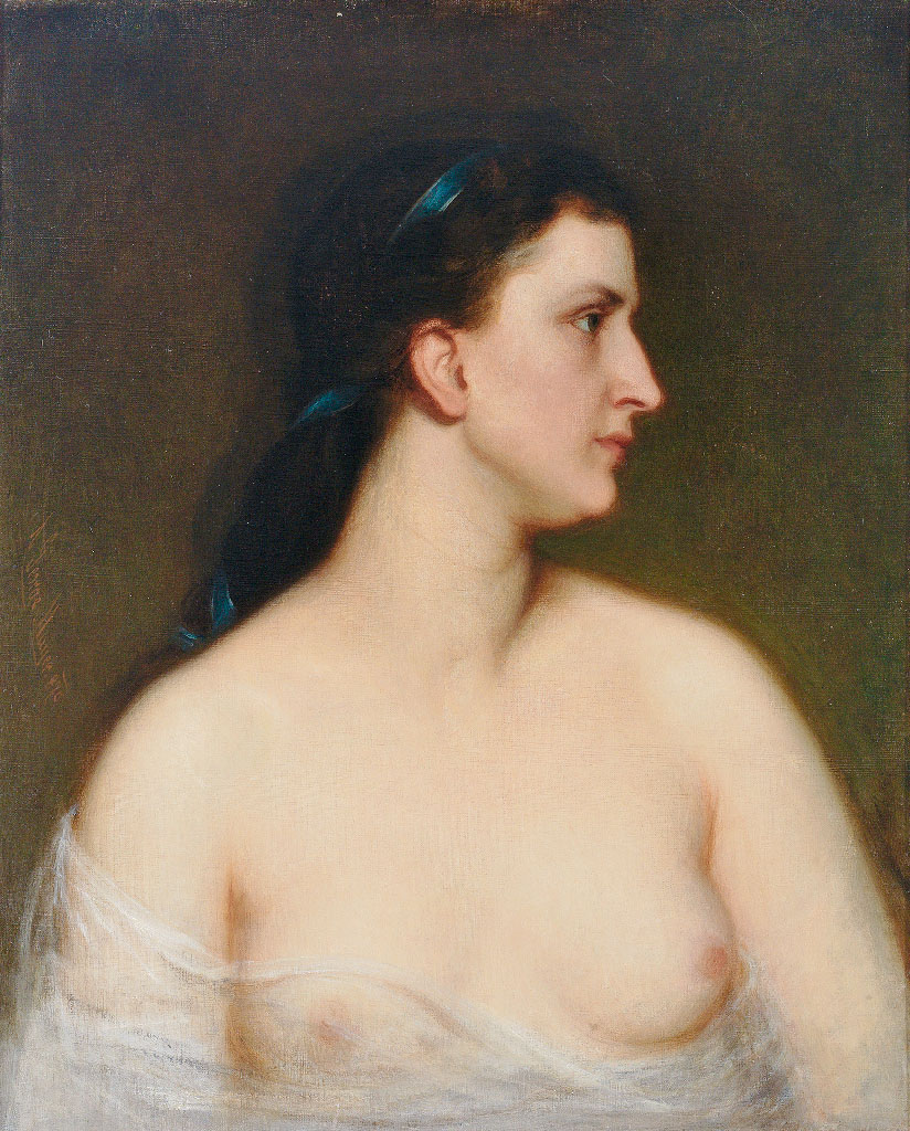 August George Mayer (1834–1889): Weibliche Aktbüste, Öl/Lwd. 63 x 50 cm, signiert und 1870 datiert Authority control GND: 117542555